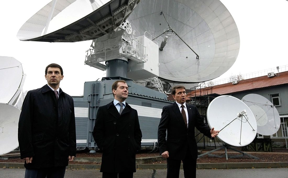 Дмитрий Медведев во время посещения Центра космической связи «Медвежьи озёра». С Министром связи и массовых коммуникаций Игорем Щёголевым (слева) и исполняющим обязанности генерального директора ФГУП «Космическая связь» Юрием Прохоровым.